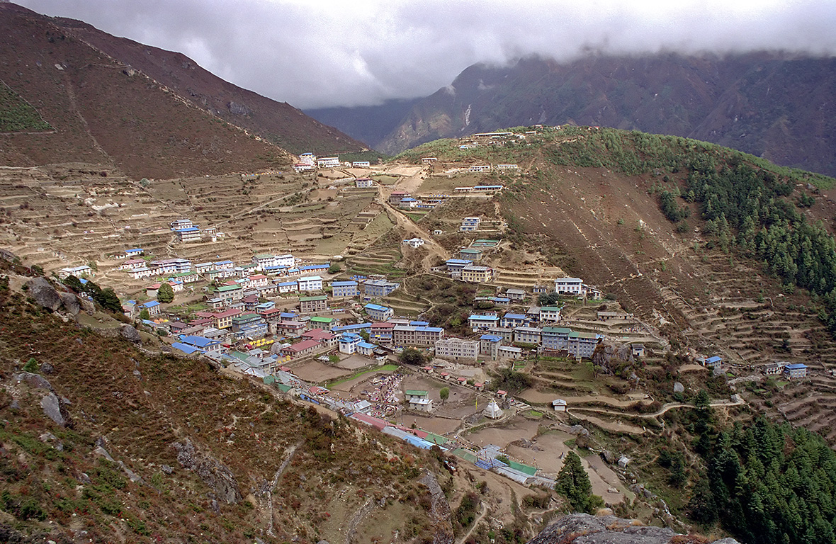 Namche Bazar (Khumbu, Nepal)